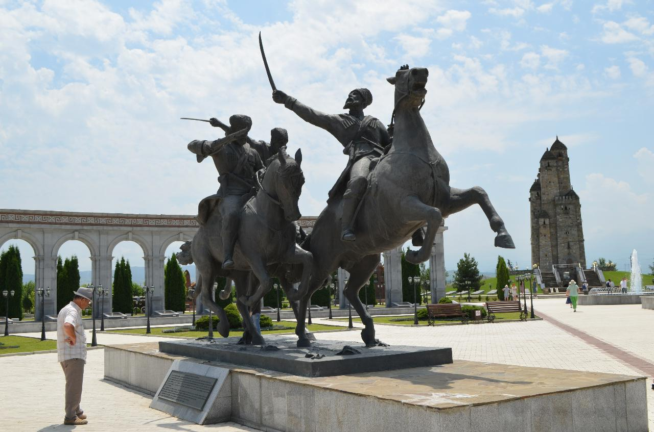 Мемориал «Девять Башен», посвященный депортации ингушского народа, Назрань, Ингушетия